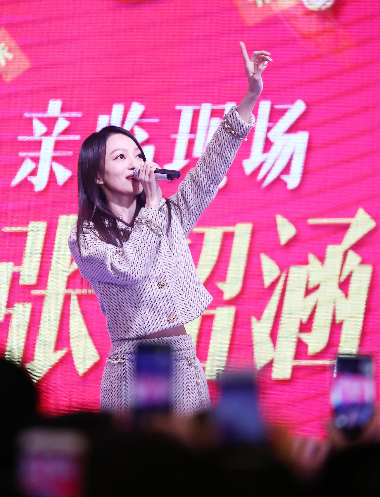 2018-3-10 红星美凯龙活动 听了安吉拉三首Live 满足~ 张韶涵